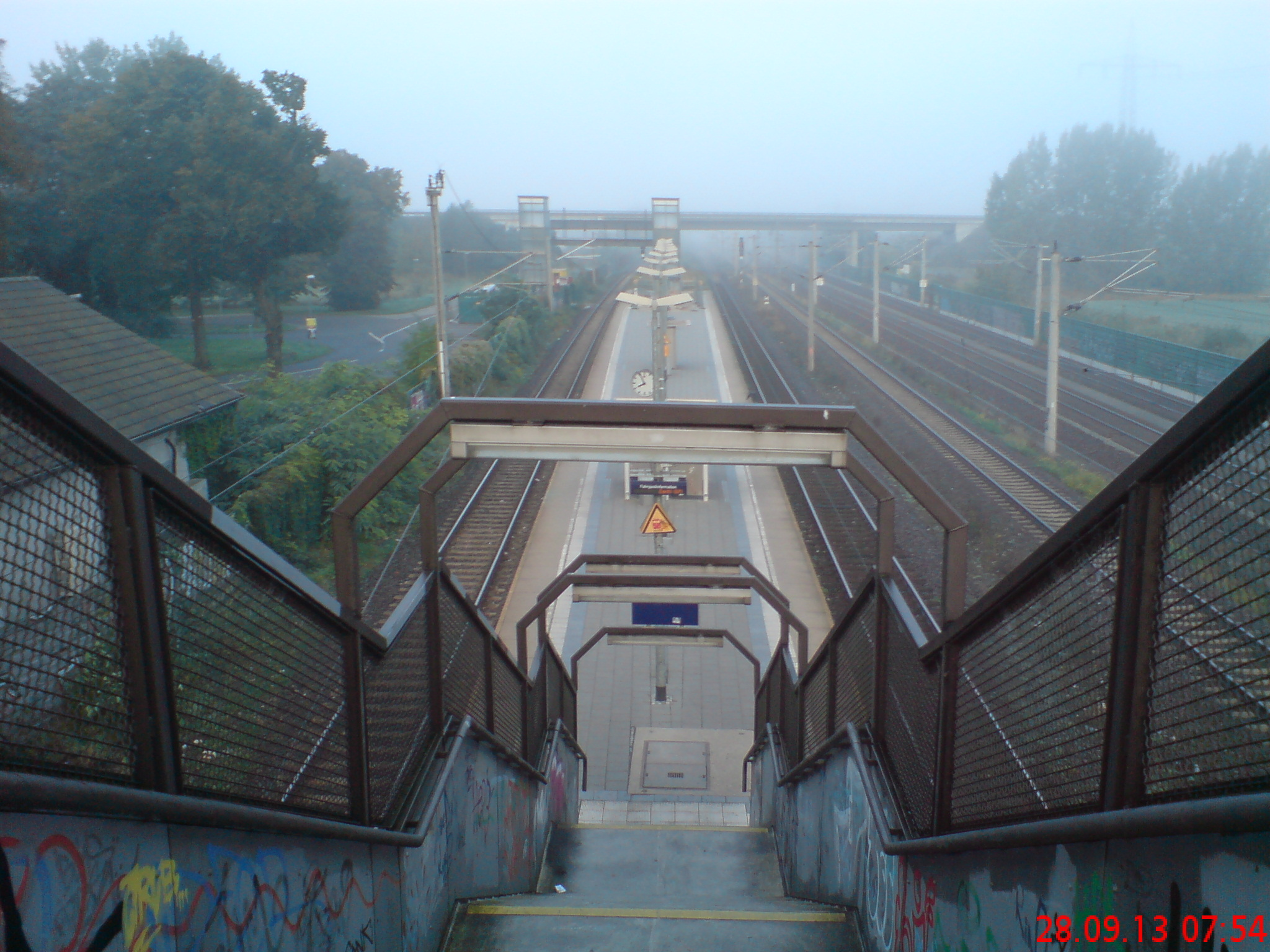 Blick auf den Bahnhof Wustermark